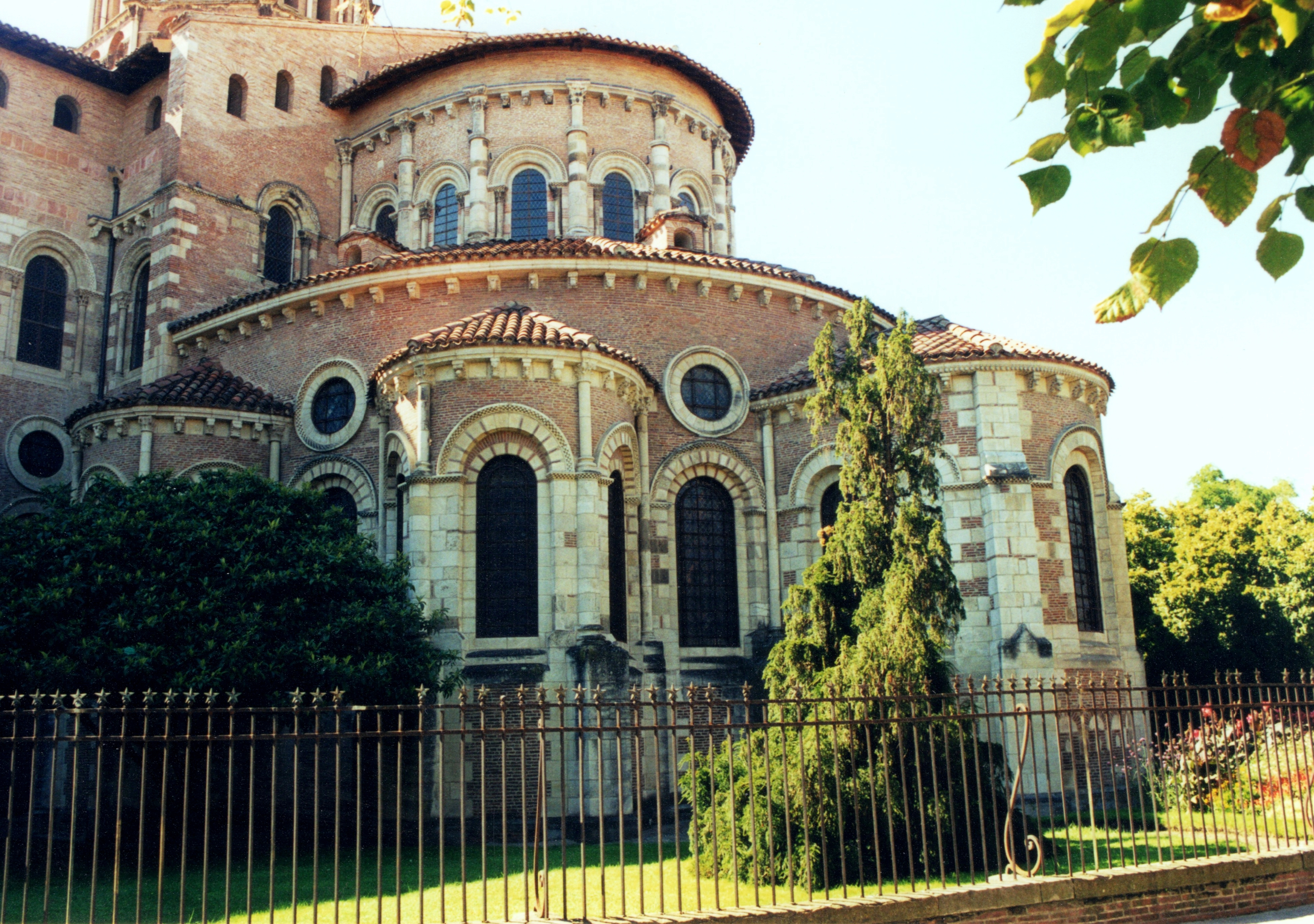 Escalonamiento de los volúmenes de la cabecera oriental de San Sernín.